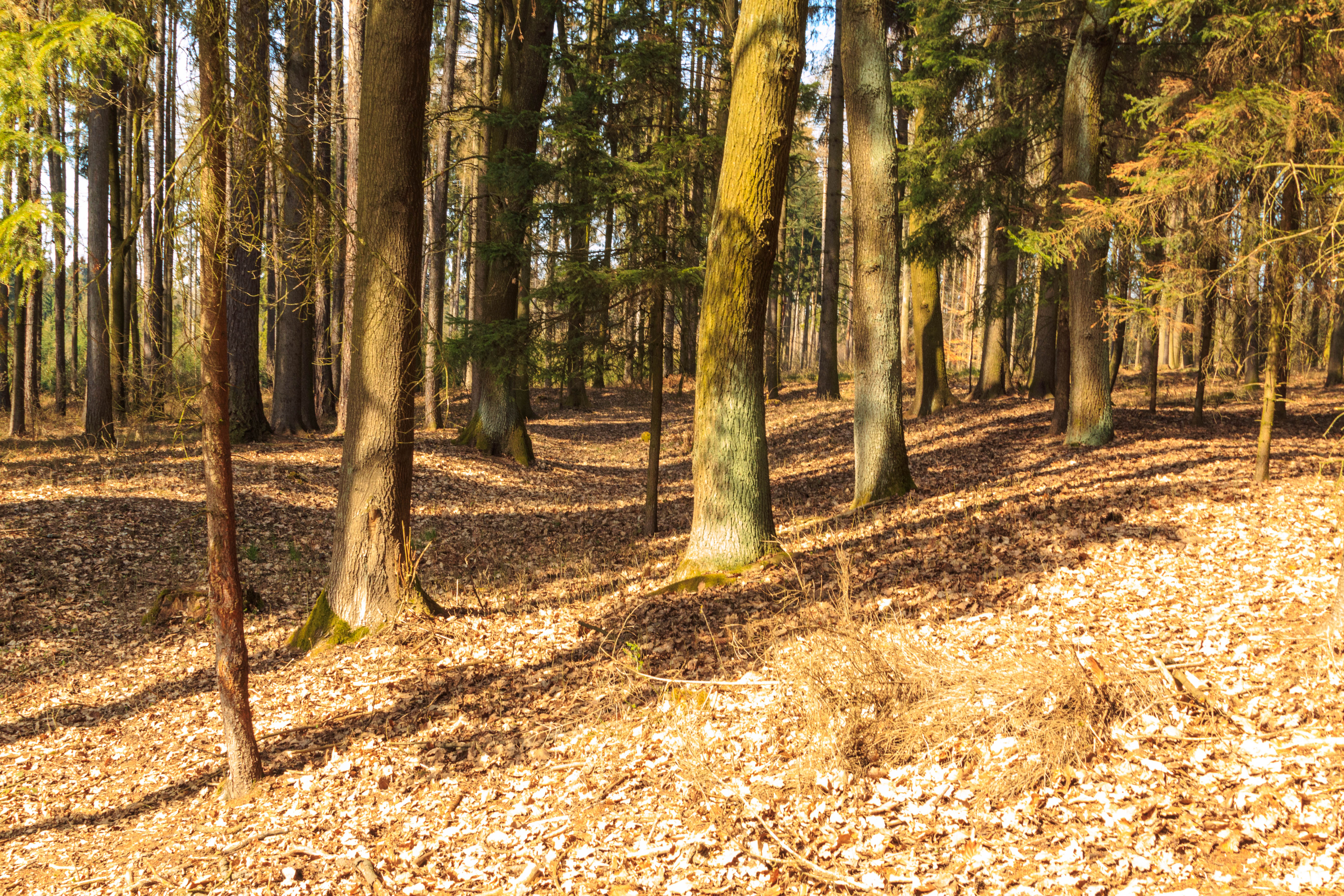 Pozůstatky valů a příkopů Třebovětického rondelu